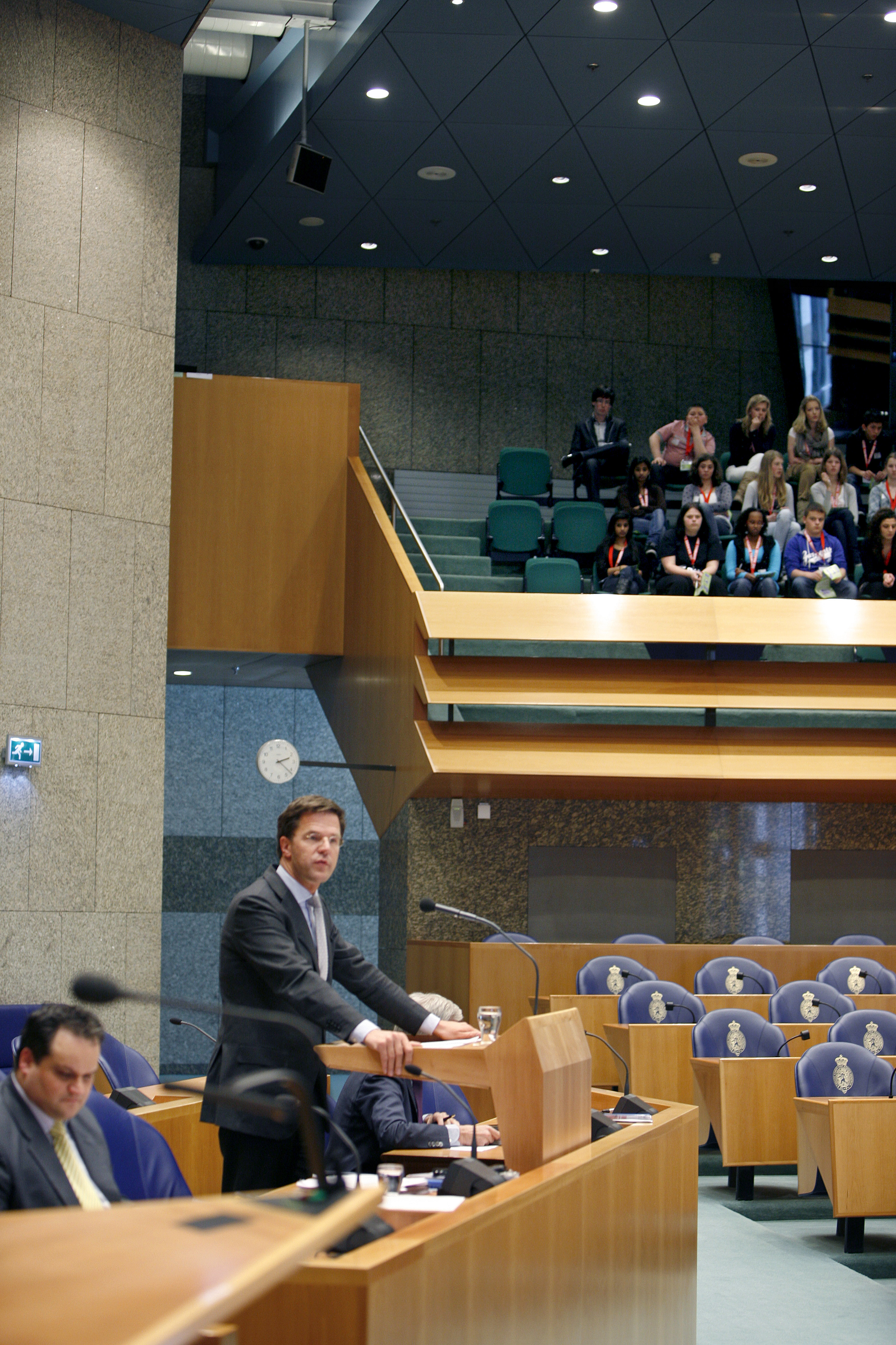 De publieke tribune hoort toe terwijl de minister-president de Nederlandse inzet tijdens de Europese Raad toelicht in de Tweede Kamer.